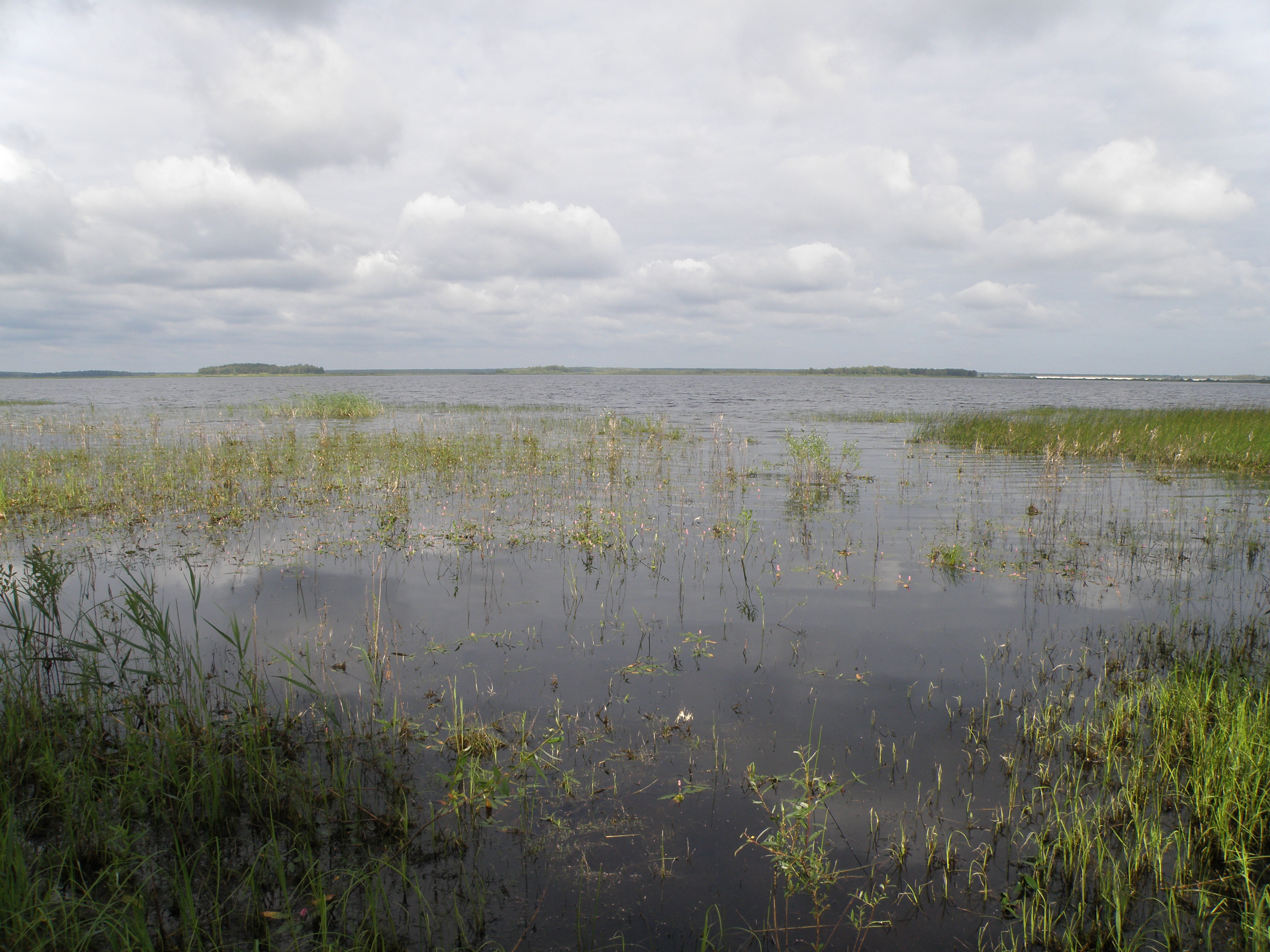 Озеро Святое летом 2012 г. (вид с восточного берега)